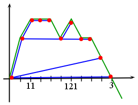 marche de Lukasiewicz et lien avec l'arbre associé